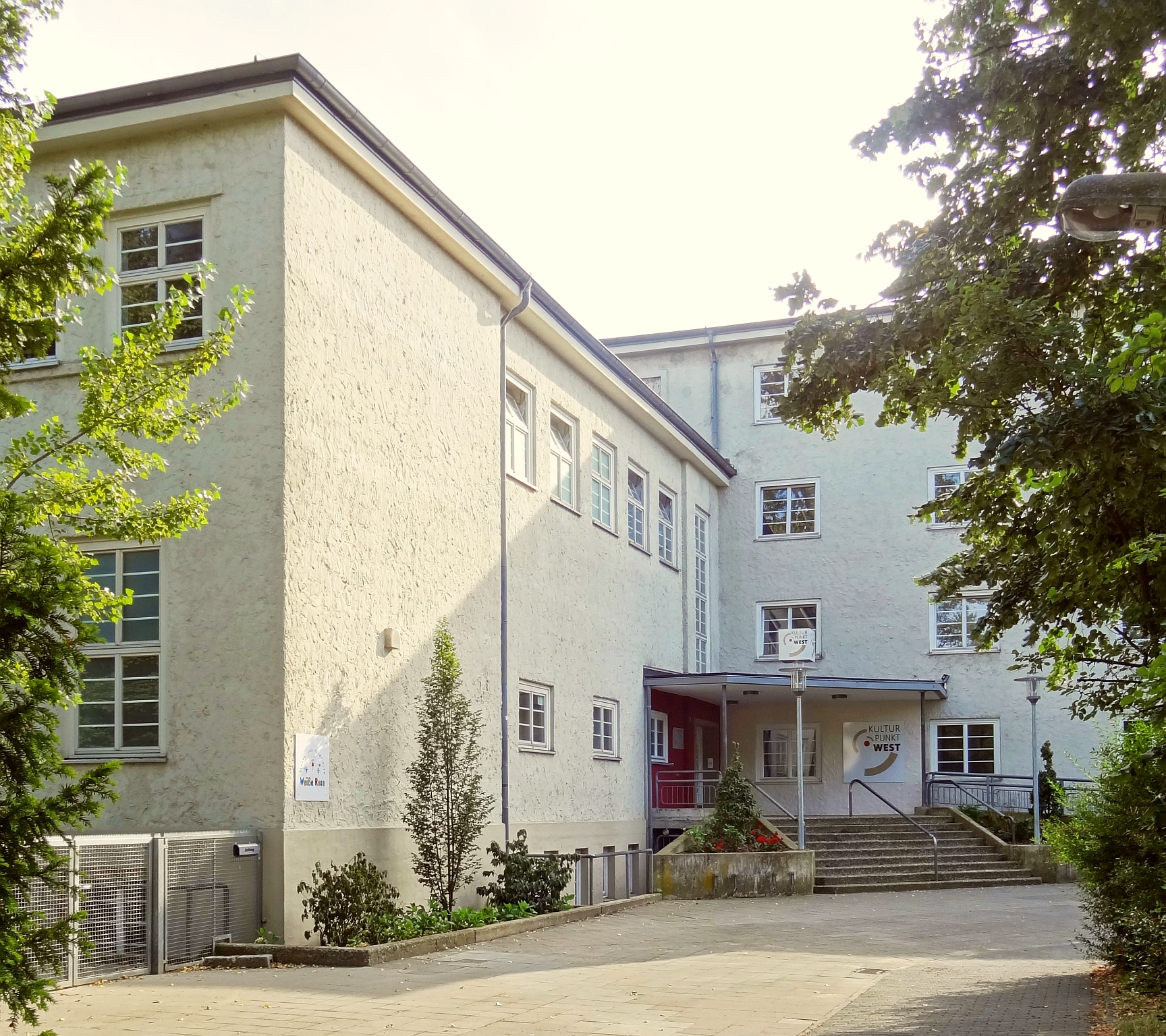 Eingangsbereich des "Kulturpunkt West" (vormals: Gemeinschaftshaus Weststadt) in der Ludwig-Winter-Straße 4, Braunschweig.